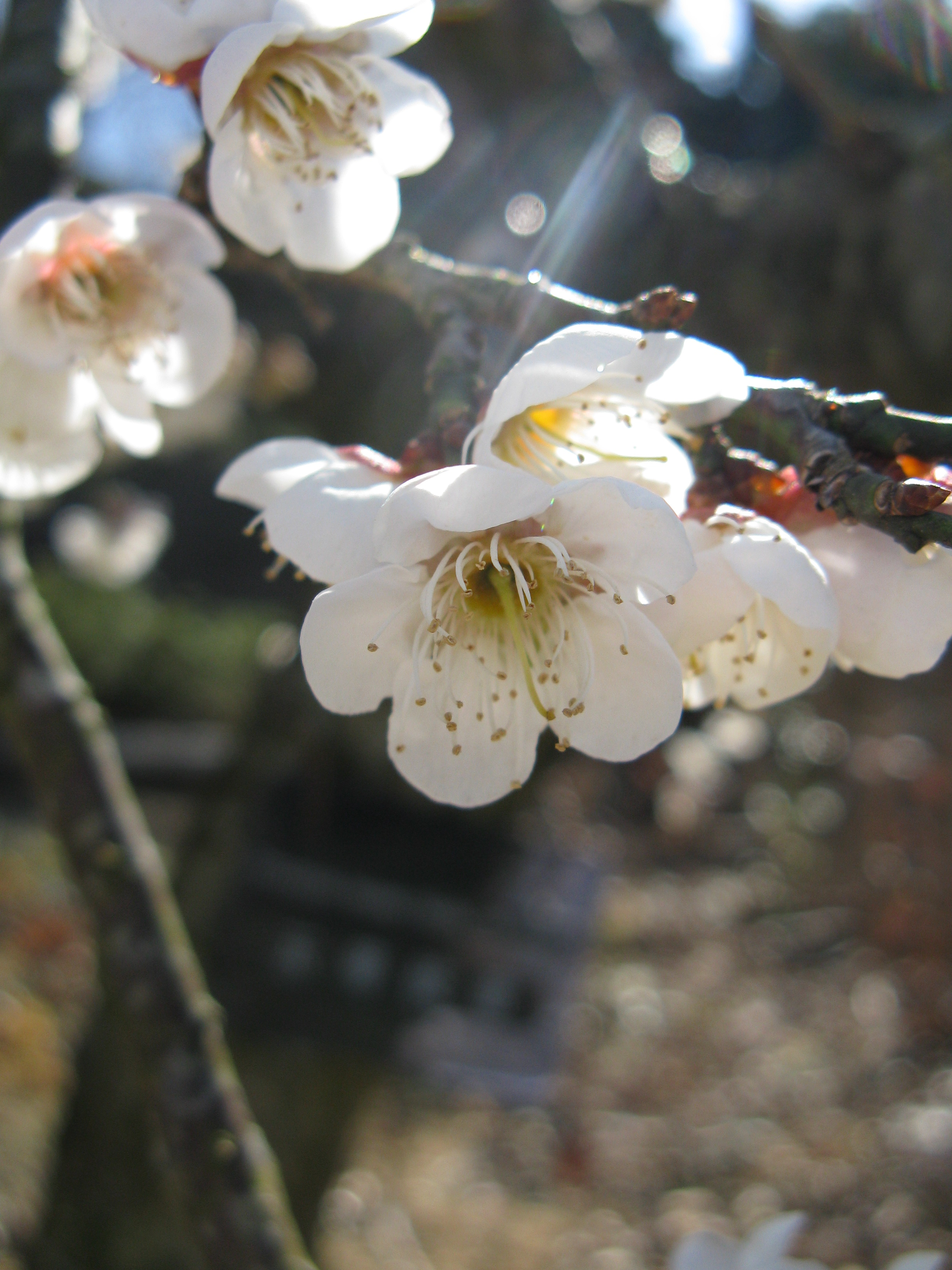 Prunus mume 'Gyokugakushidare'